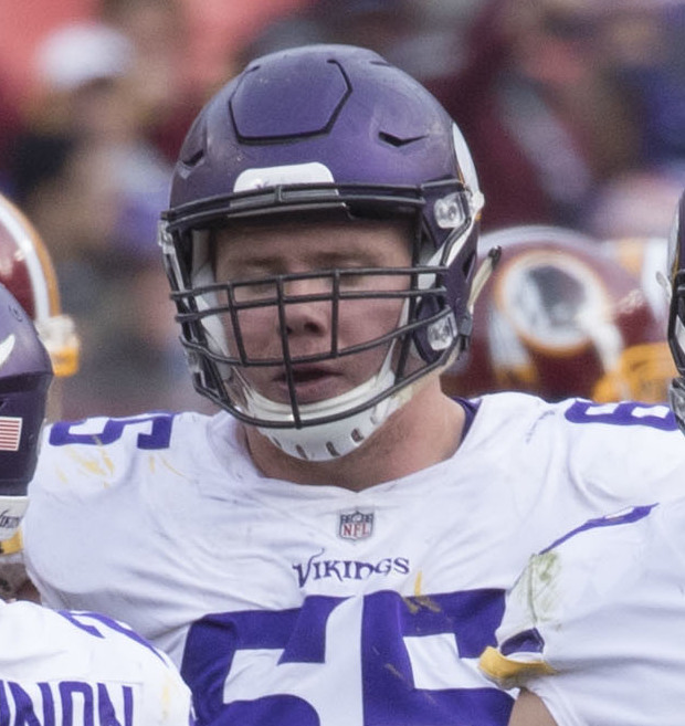 Vikings at Redskins 11/12/17